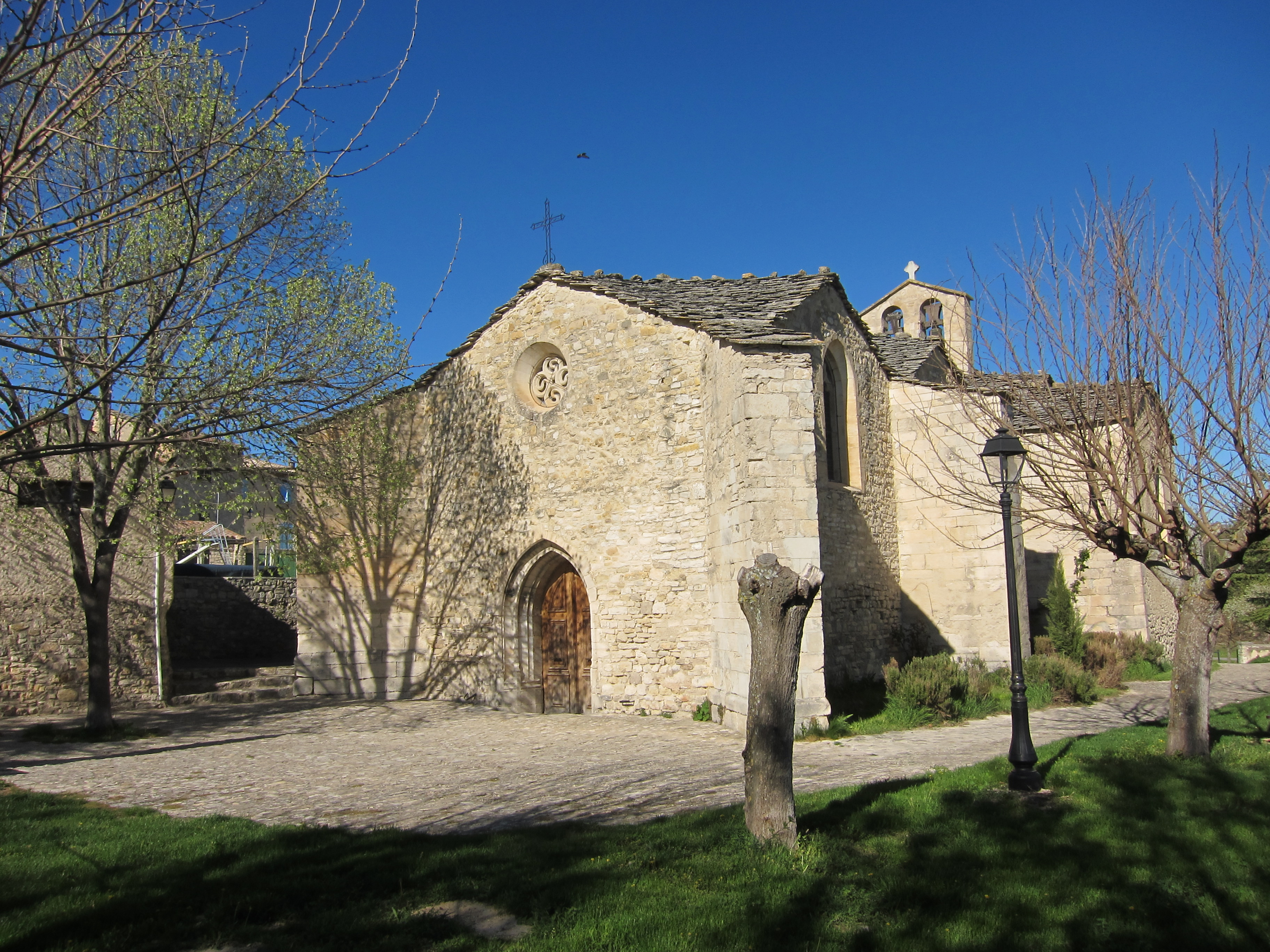 Dimanche de Pâques après-midi